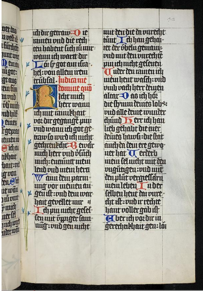 Textura im Psalter (Kalender, Biblia Pauperum) Eichstätt/ Bayern um 1430/1450